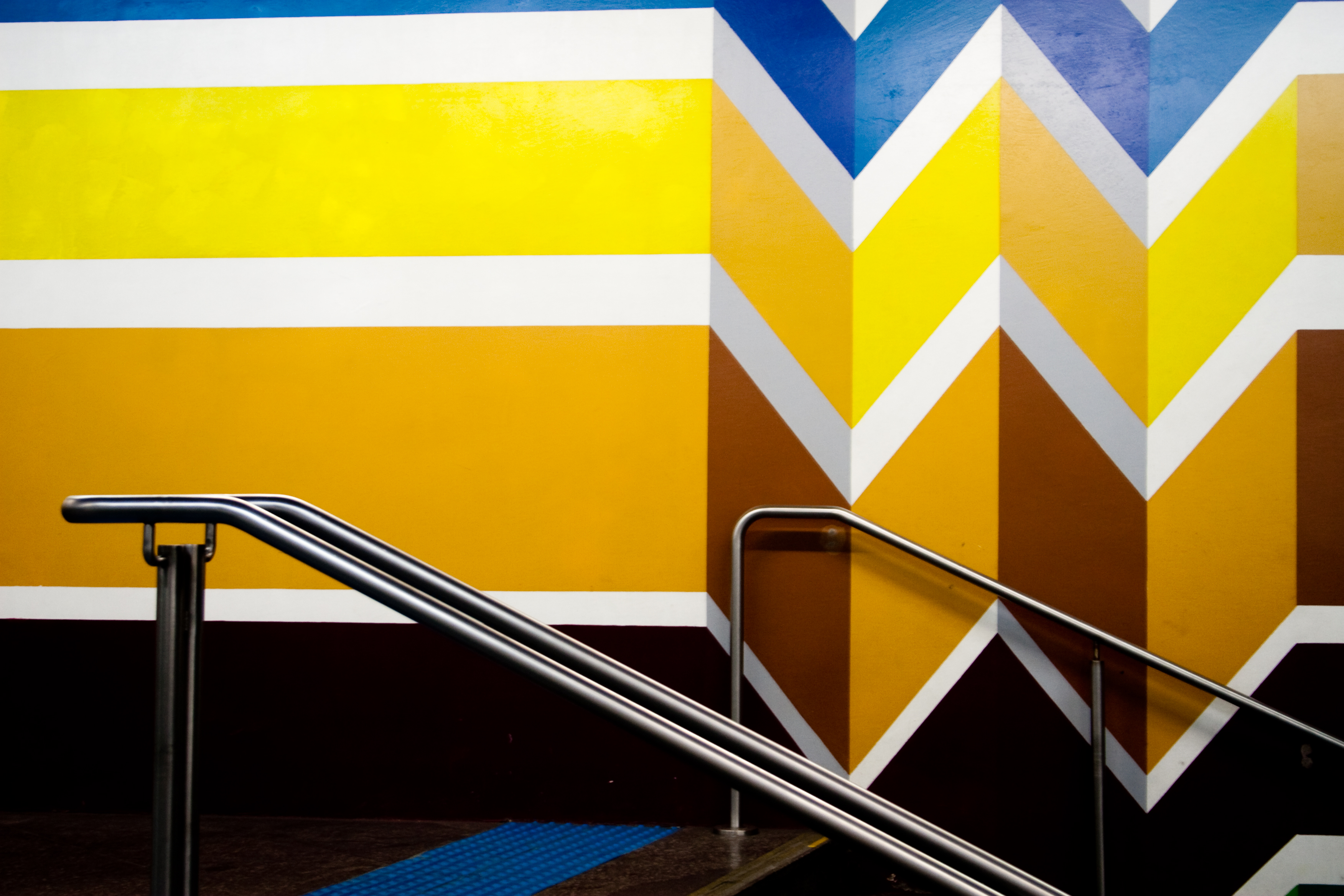 Estação de Metrô São Bento - Acesso à estação em frente ao jardim. Foto por André Deak para o Arte Fora do Museu (